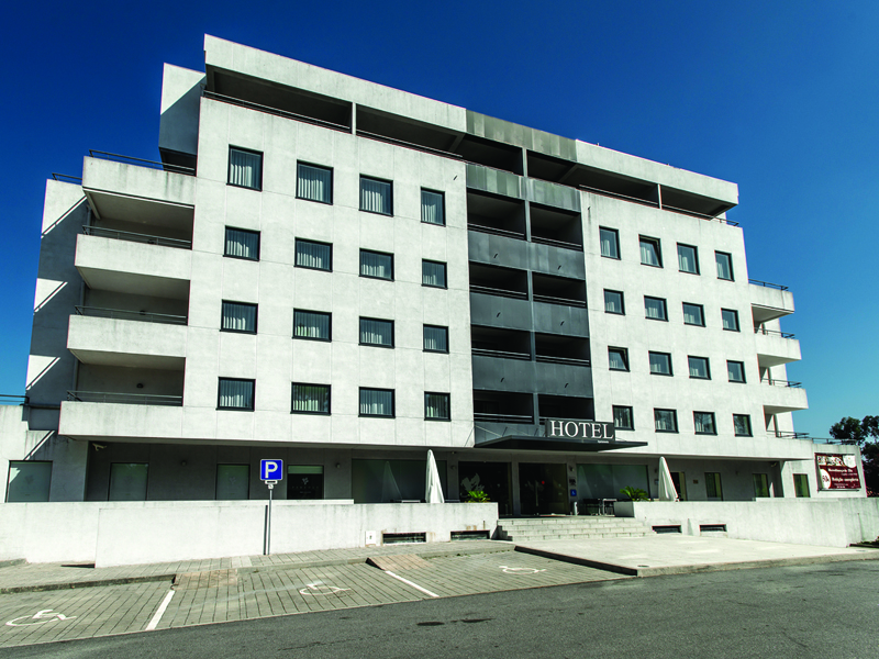 Paredes Hotel Apartamento